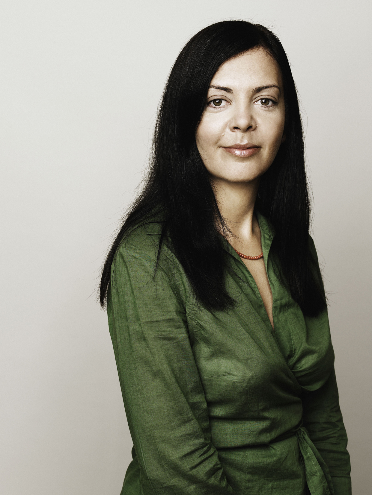 Die österreichische Politikerin Birgit Schatz, Mitglied der Grünen